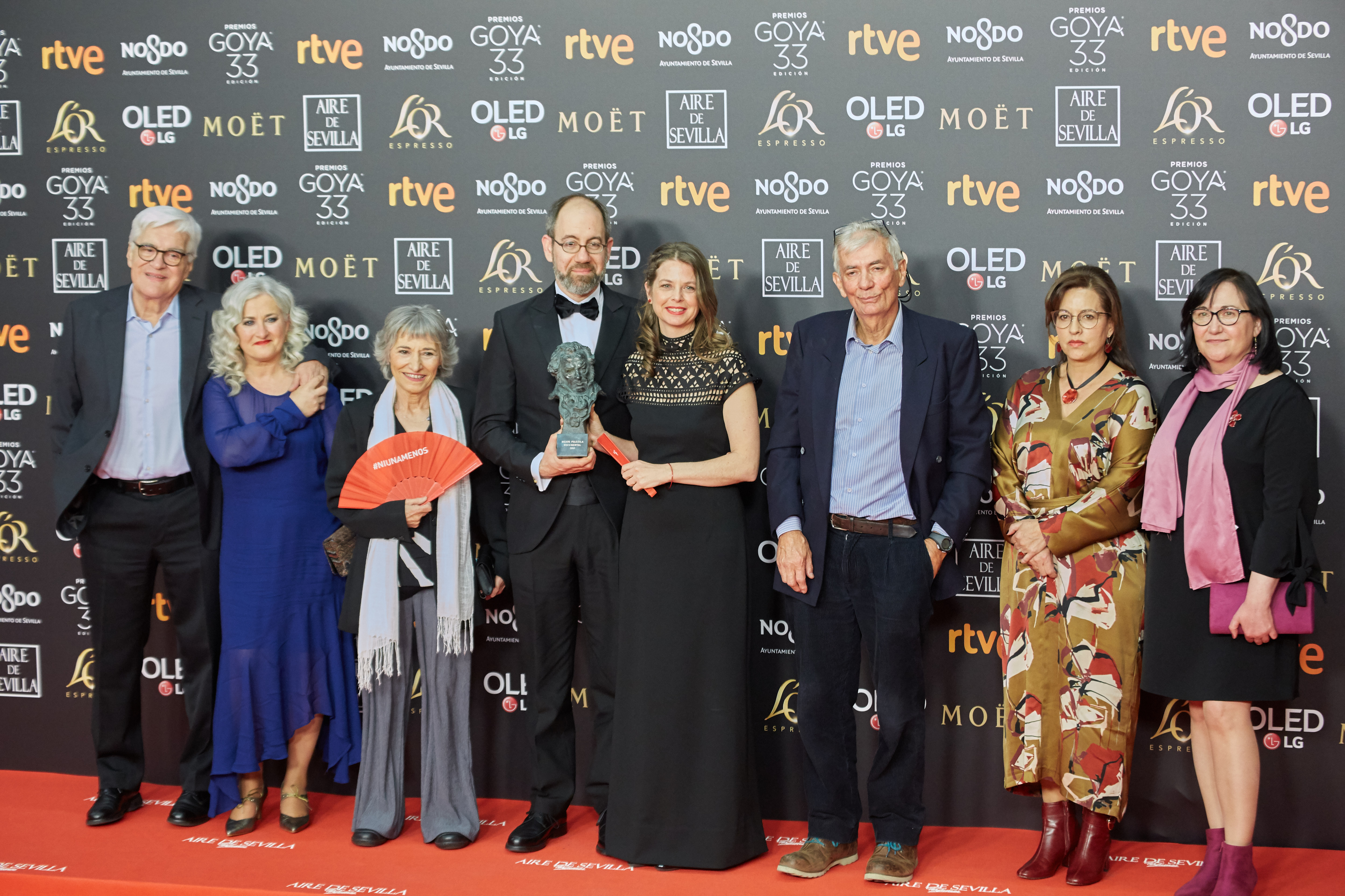 Ganadores del Goya 2019 a la Mejor Película Documental por El silencio de otros